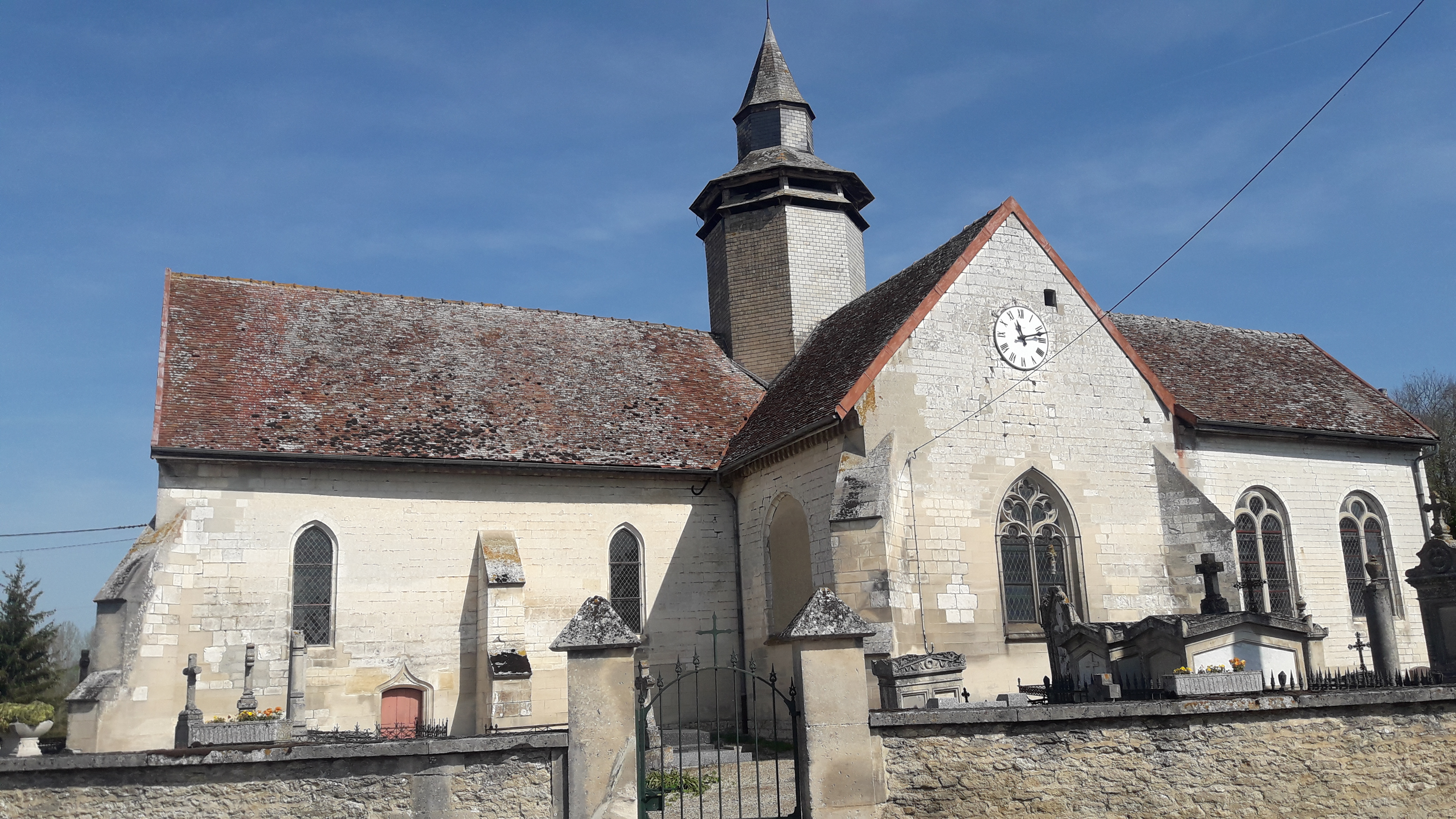 Église de Pougy (Aube)